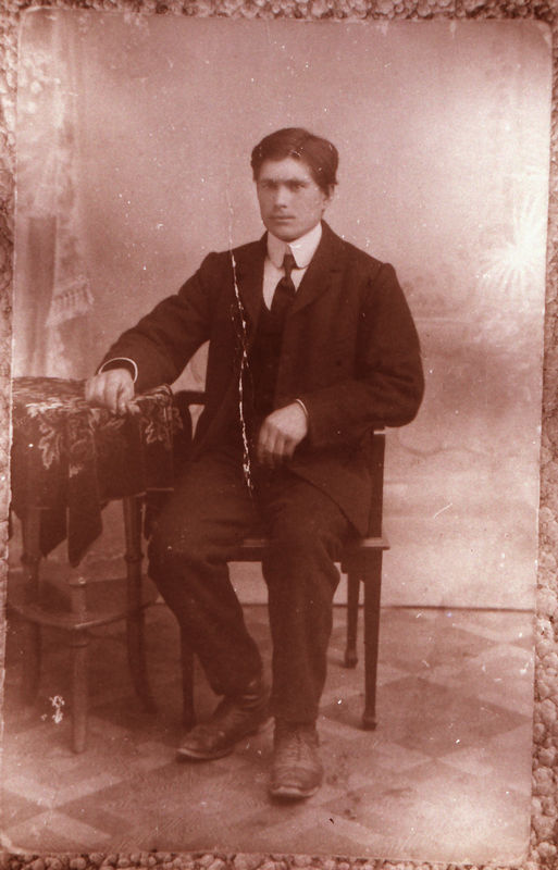 Peeter Luurmees, Klooga Hariduse Seltsi ja seltsi raamatukogu asutaja